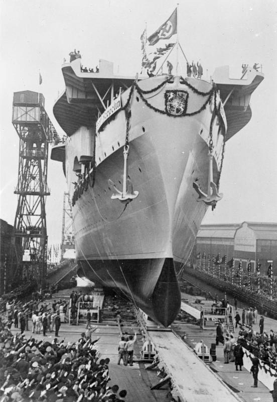 Graf Zeppelin. Flugzeugträger. Stapell.: 8.12.1938. Stapellauf C 637 (R IX E 6058)